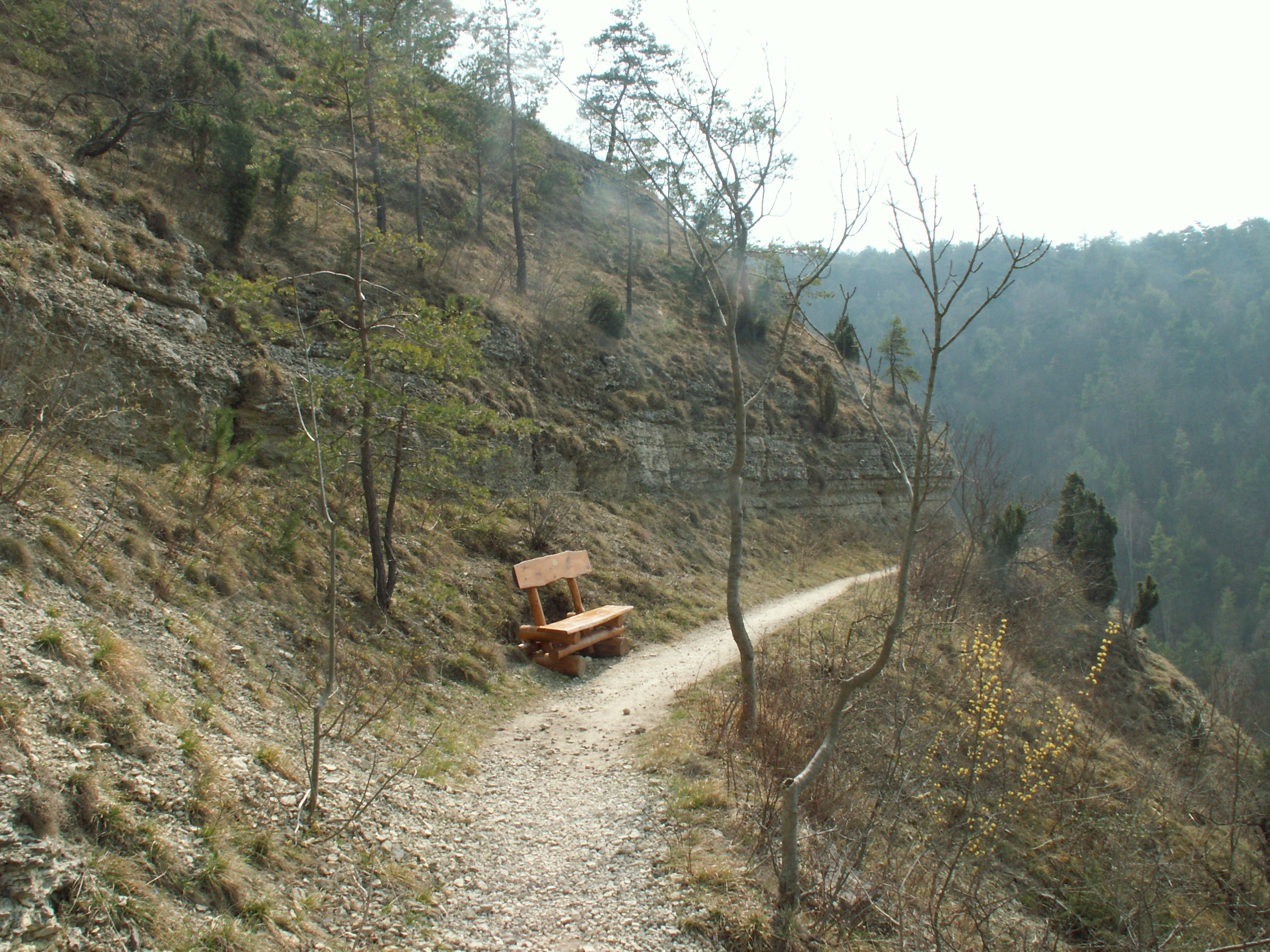 Jena, Wanderweg am Hummelsberg, Naturschutzgebiet „Kernberge und Wöllmisse bei Jena“